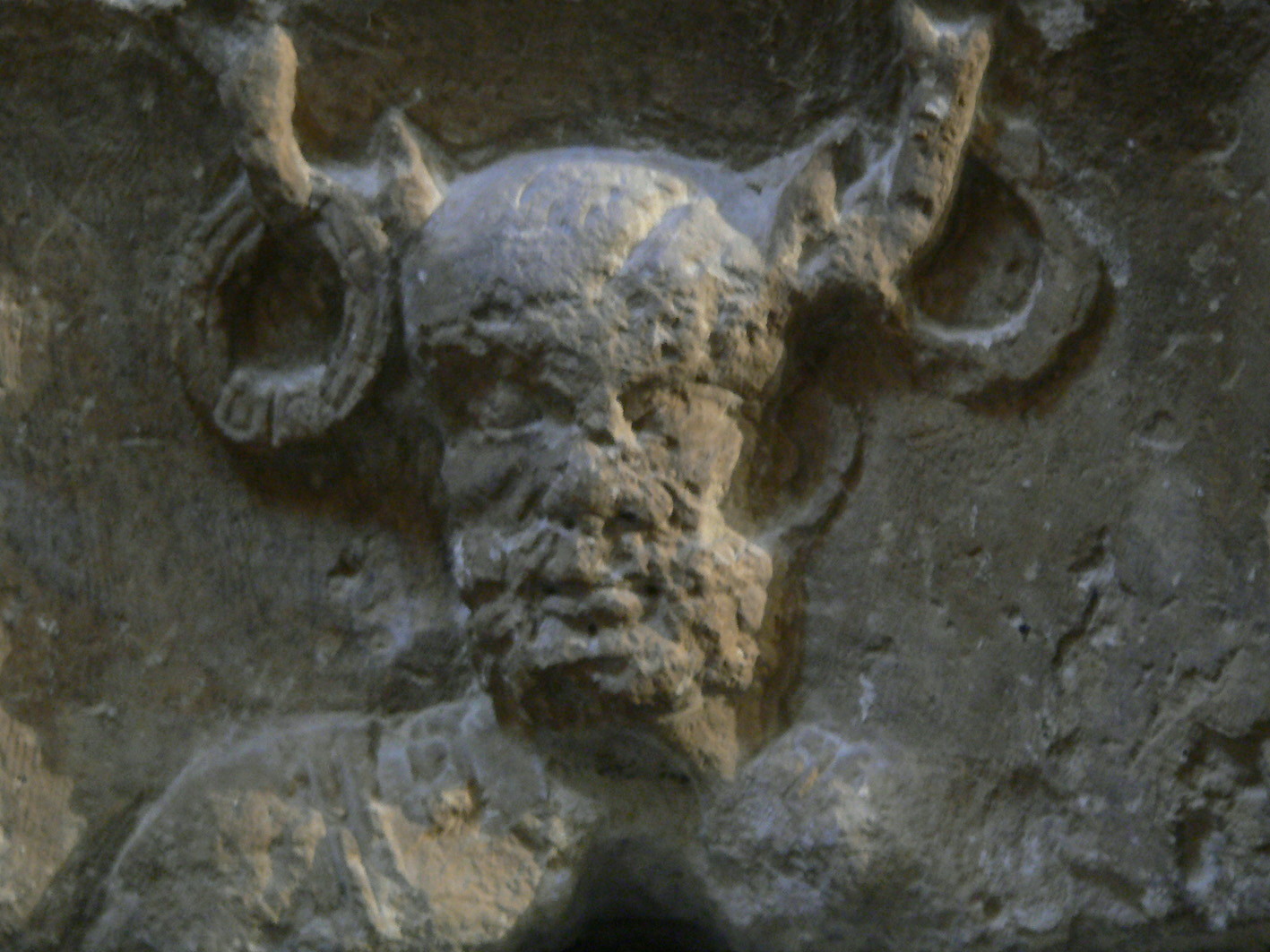 Le dieu celtique Cernunnos sur Le pilier des Nautes au Musée National du Moyen Age dans les Thermes de Cluny Source : Clio20